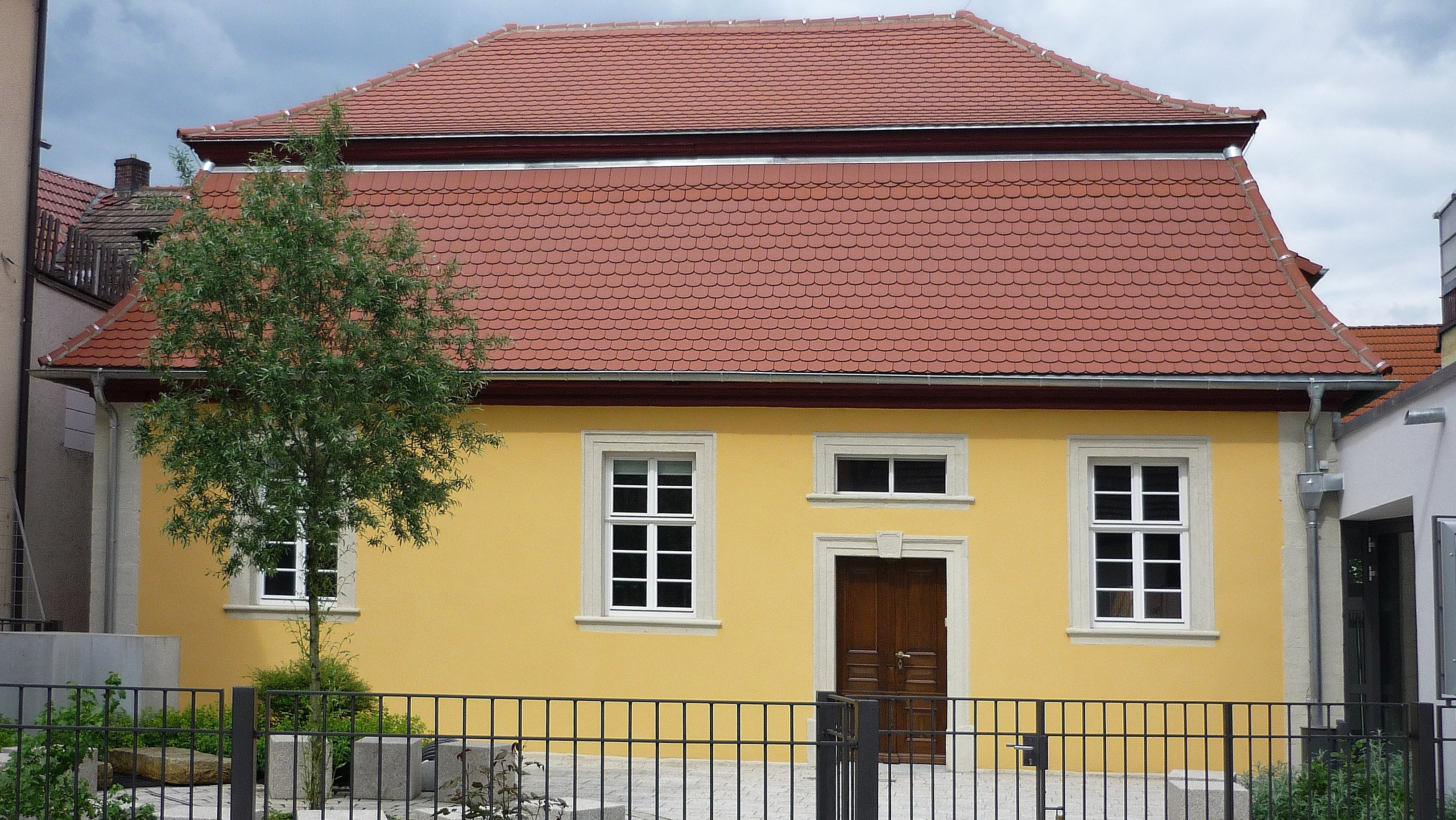 Ehemalige Synagoge; 1797, 1867 erneuert, eingeschossiger verputzter Bau mit Mansarddach.This is a photograph of an architectural monument.